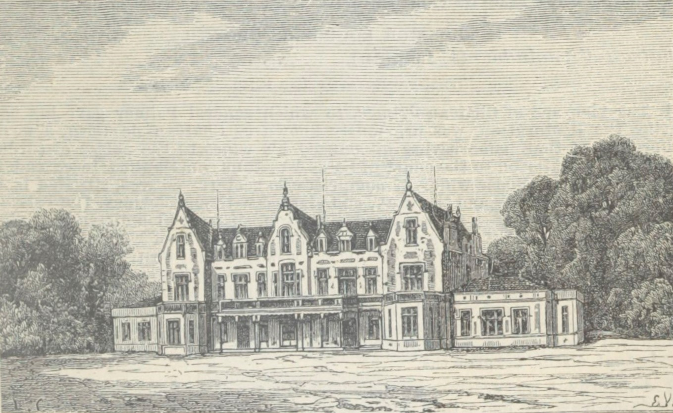 Illustration du Château Cantenac-Brown dans l'ouvrage Bordeaux et ses vins (7ème édition) de Charles Cocks et Edouard Féret publié en 1898